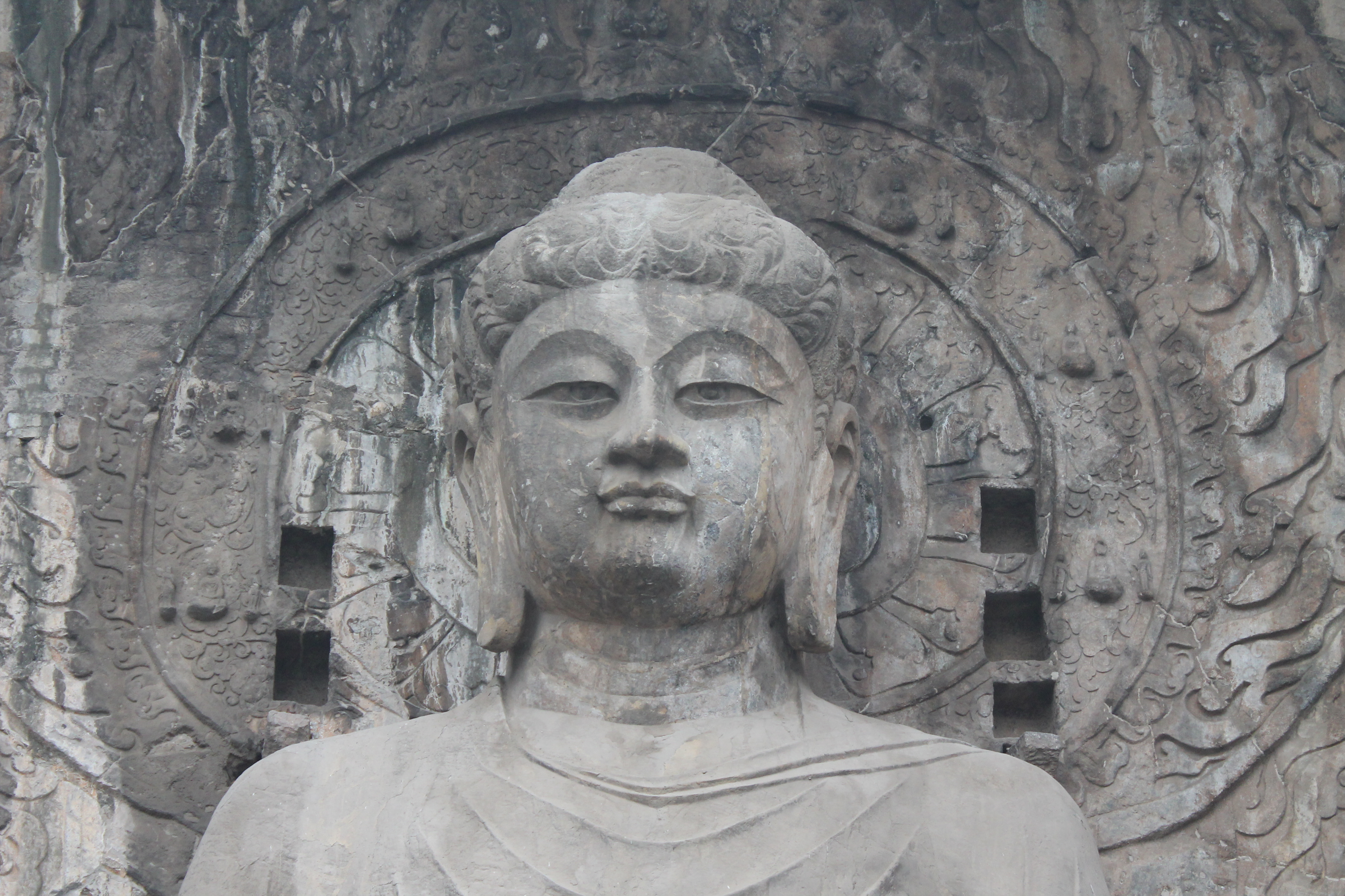 Big Buddha at the Longmen Grottoes